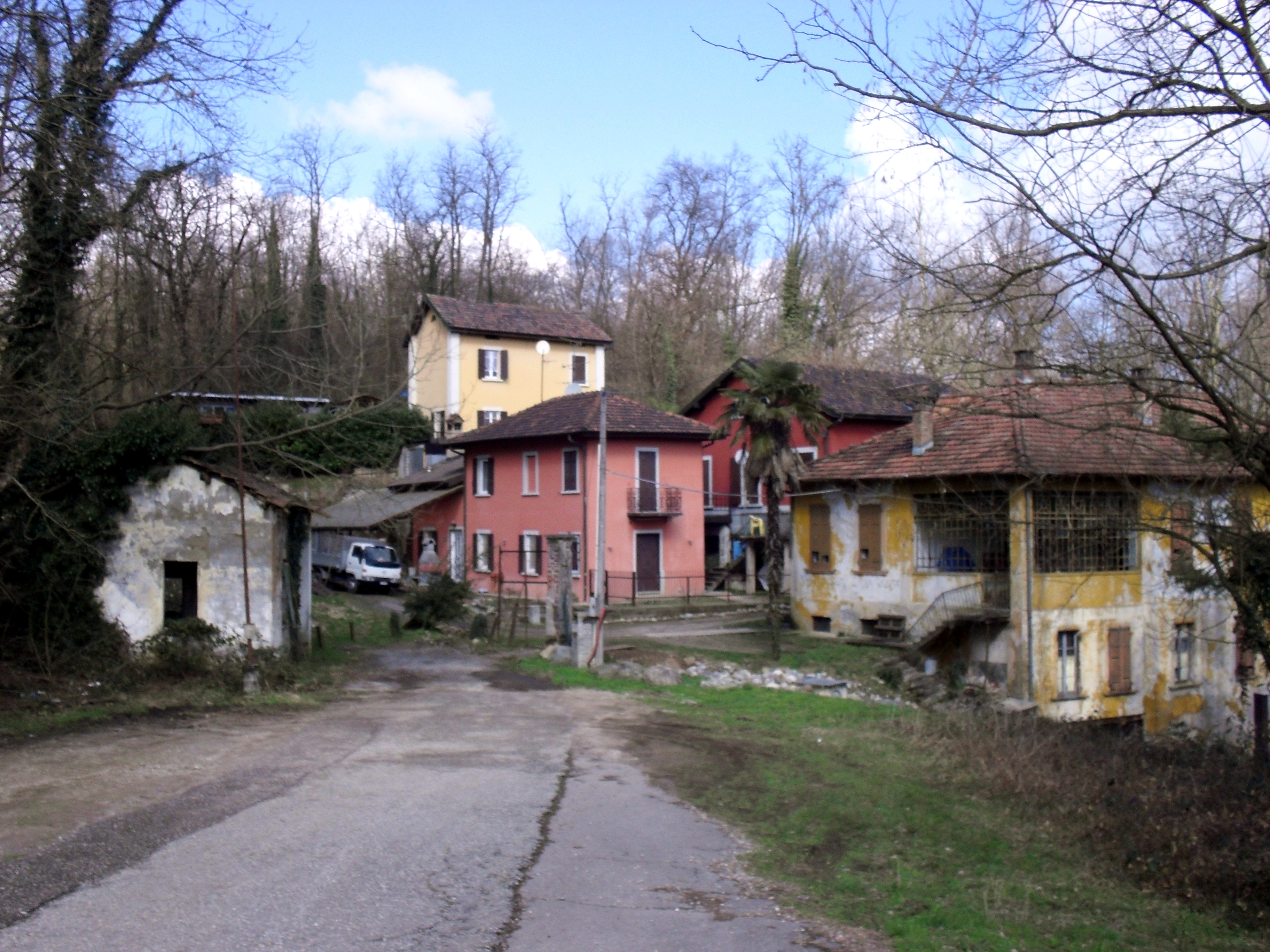 Confine italo-svizzero di Rodero-Stabio